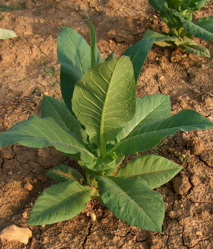 Nicotiana tabacum, junge Tabakpflanze